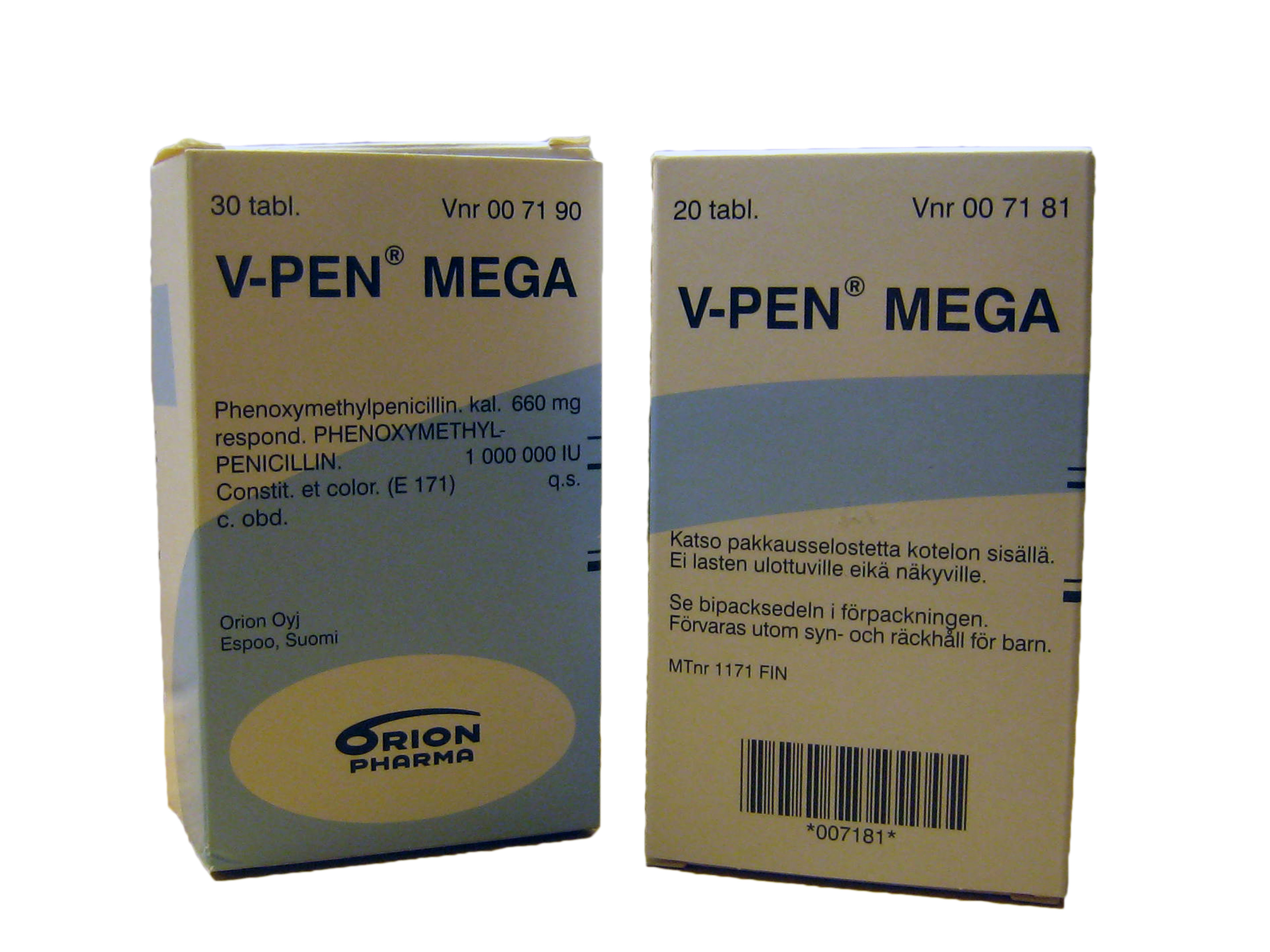 V-PEN® MEGA -lääkkeen myyntipakkauksia.